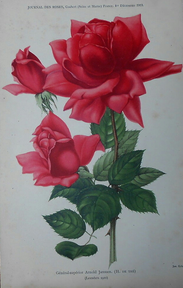 Rose hybride de thé 'Generalsuperior Arnold Janssen' (Leenders 1911), chromolithographie parue dans le numéro de décembre 1913 du Journal des roses.